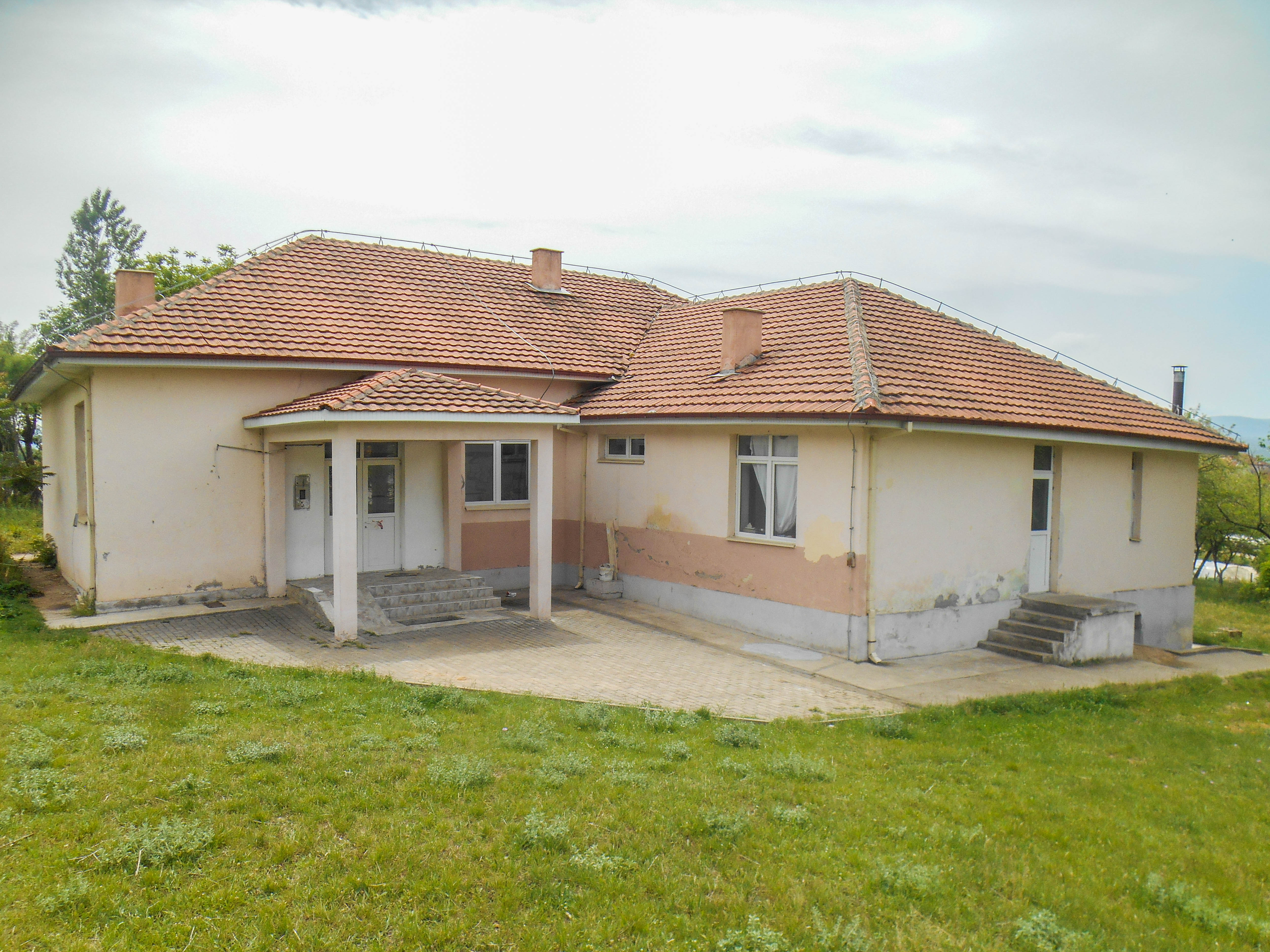 Основно училиште „Гоце Делчев“ - Сушево